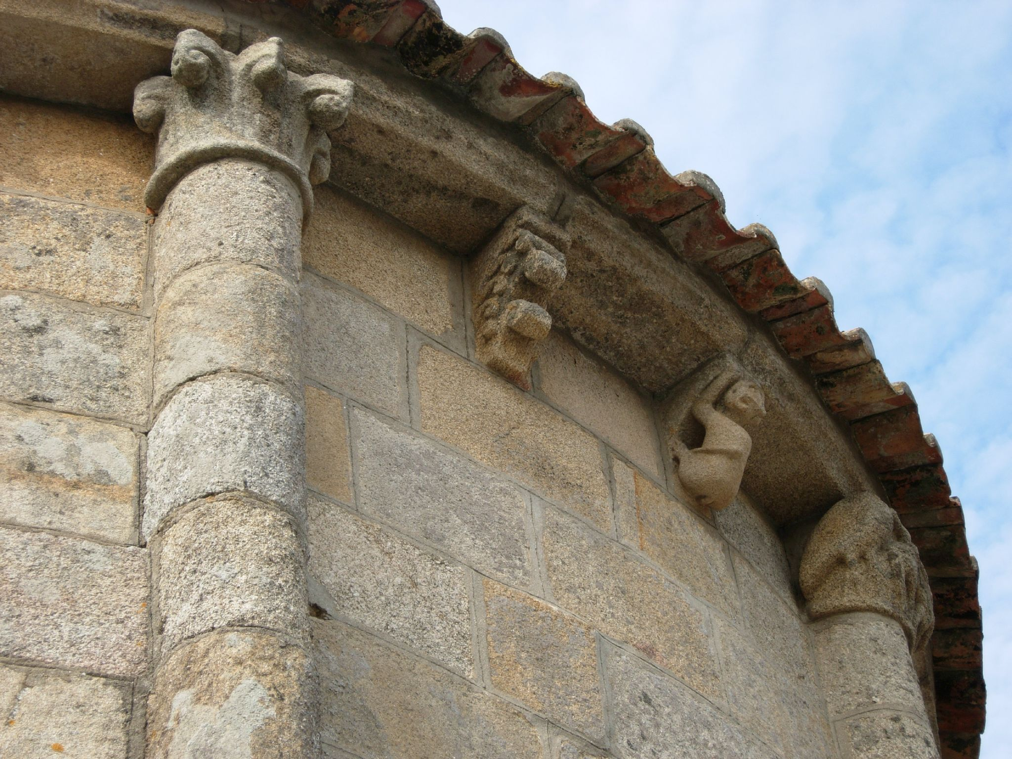 Capiteis e canzorros no aleiro da ábsida da Igrexa de San Martiño de Sobrán - Vilagarcía de Arousa - Pontevedra